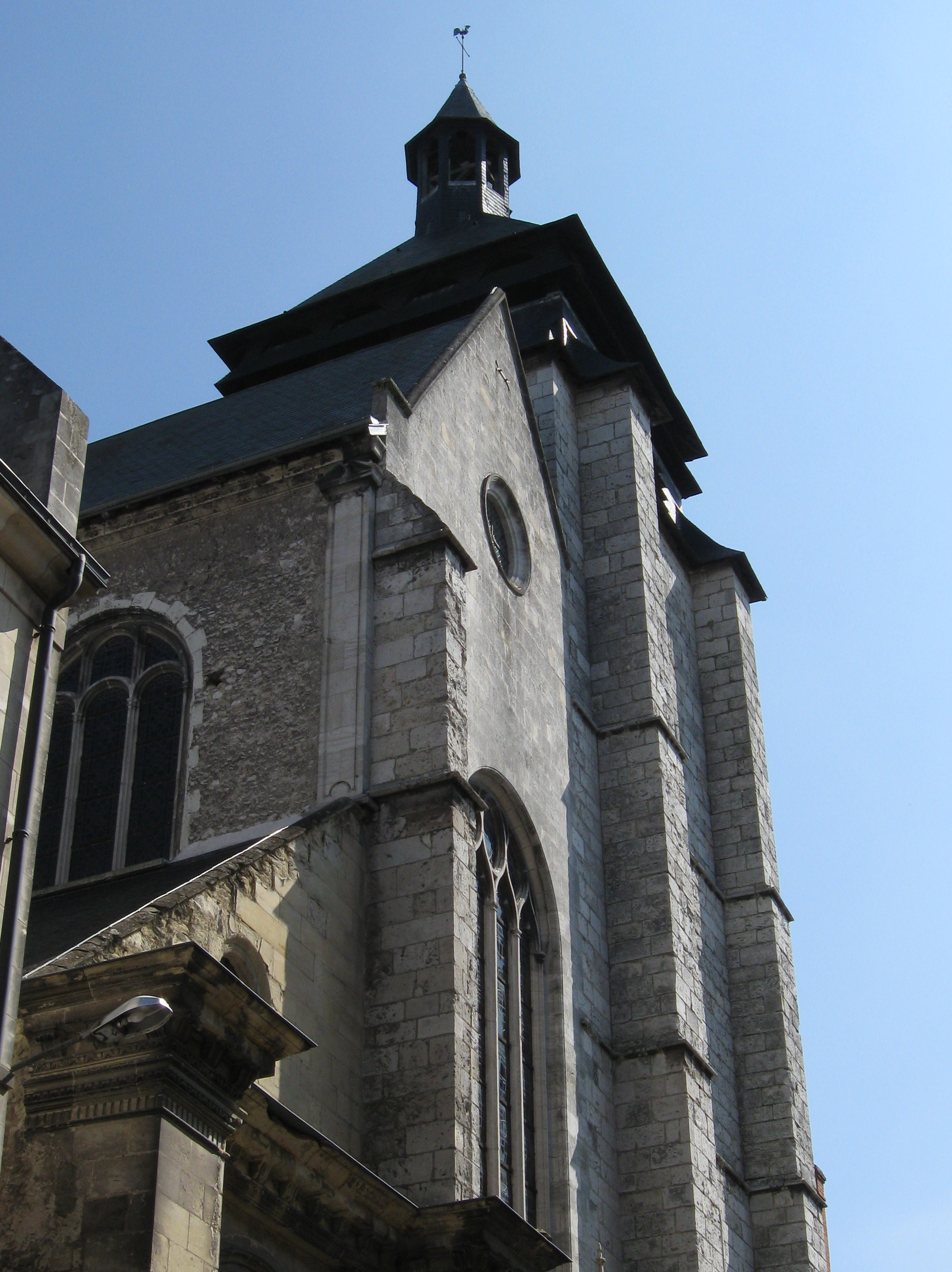 Église Notre-Dame de Recouvrance, Orléans, Loiret, France, Orléans, Loiret, France